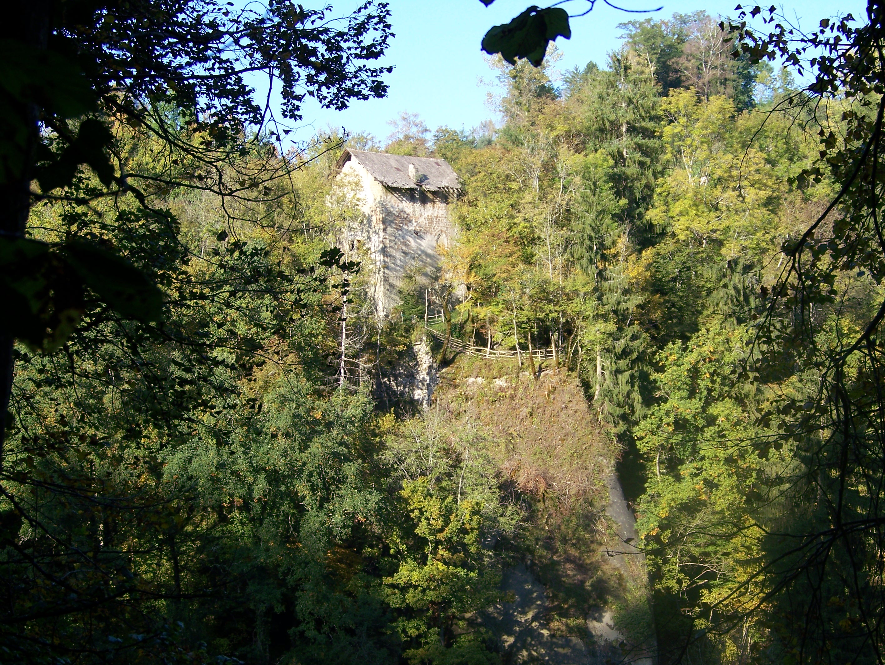 Château de Pierrecharve vu depuis la falaise avec la terrasse "la proue du navire" en cours d'aménagement.